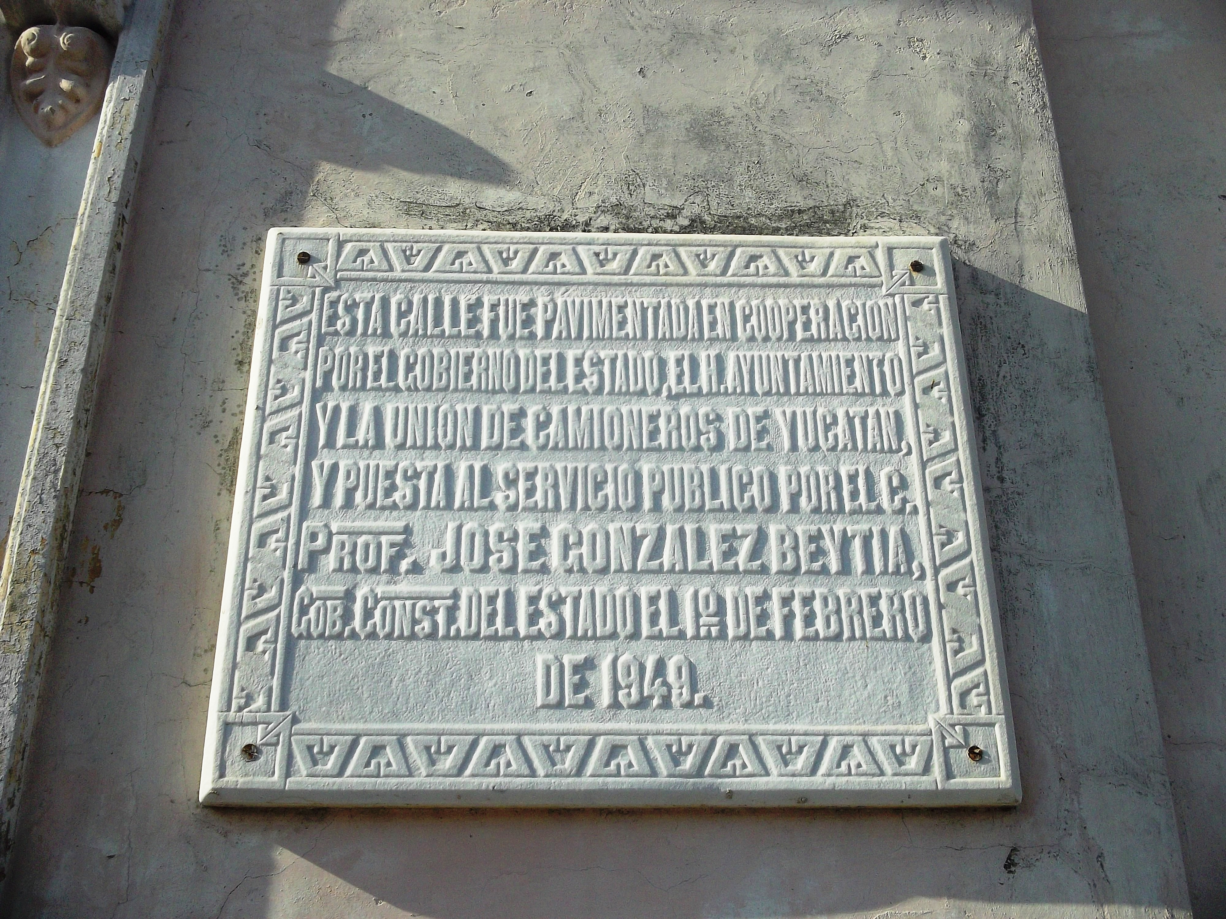 Cruz del Atrio de la Catedral de San Idelfonso, Mérida, Yucatán.